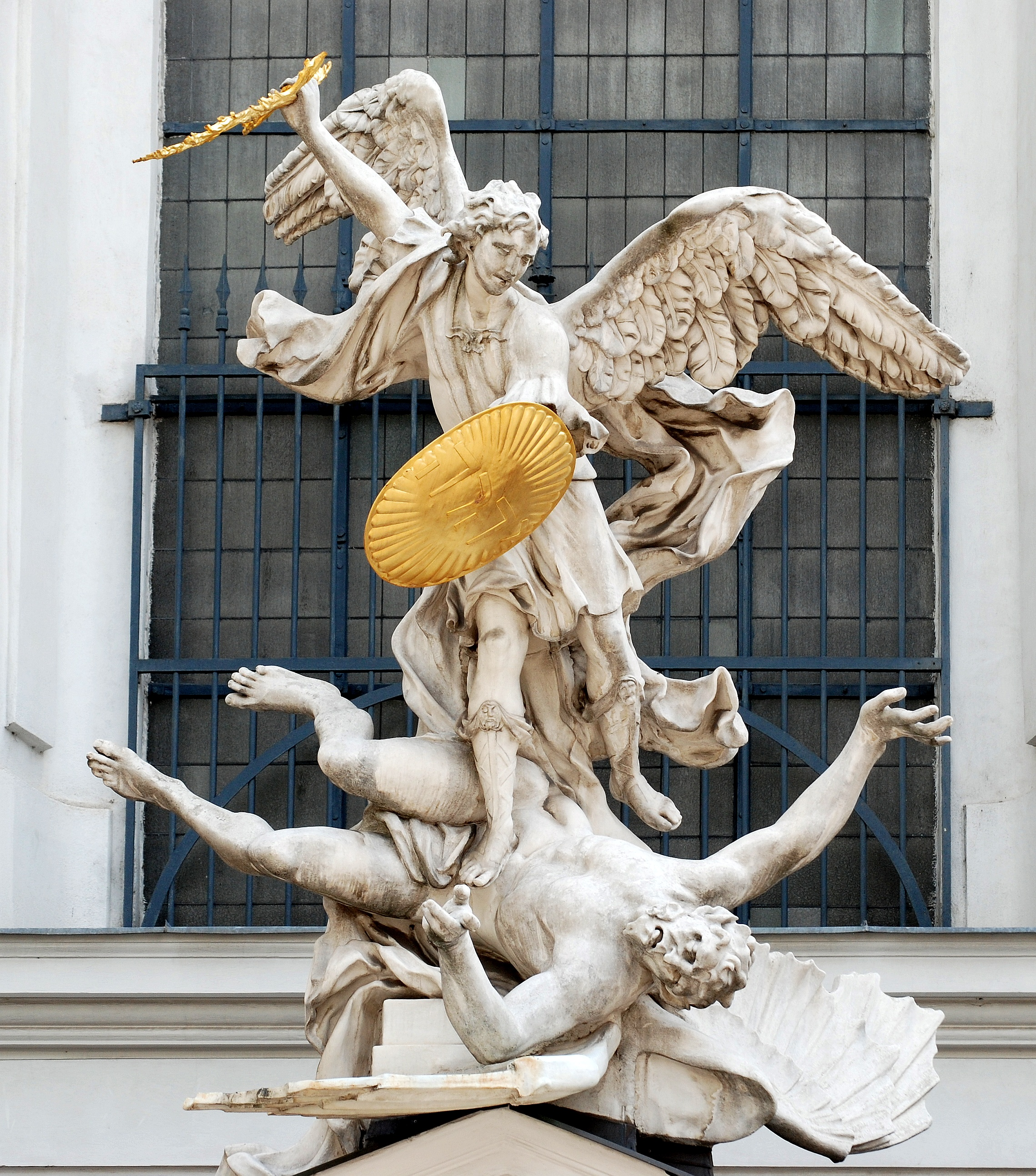 Archangel Michael - Saint Michael Church, Vienna, Austria